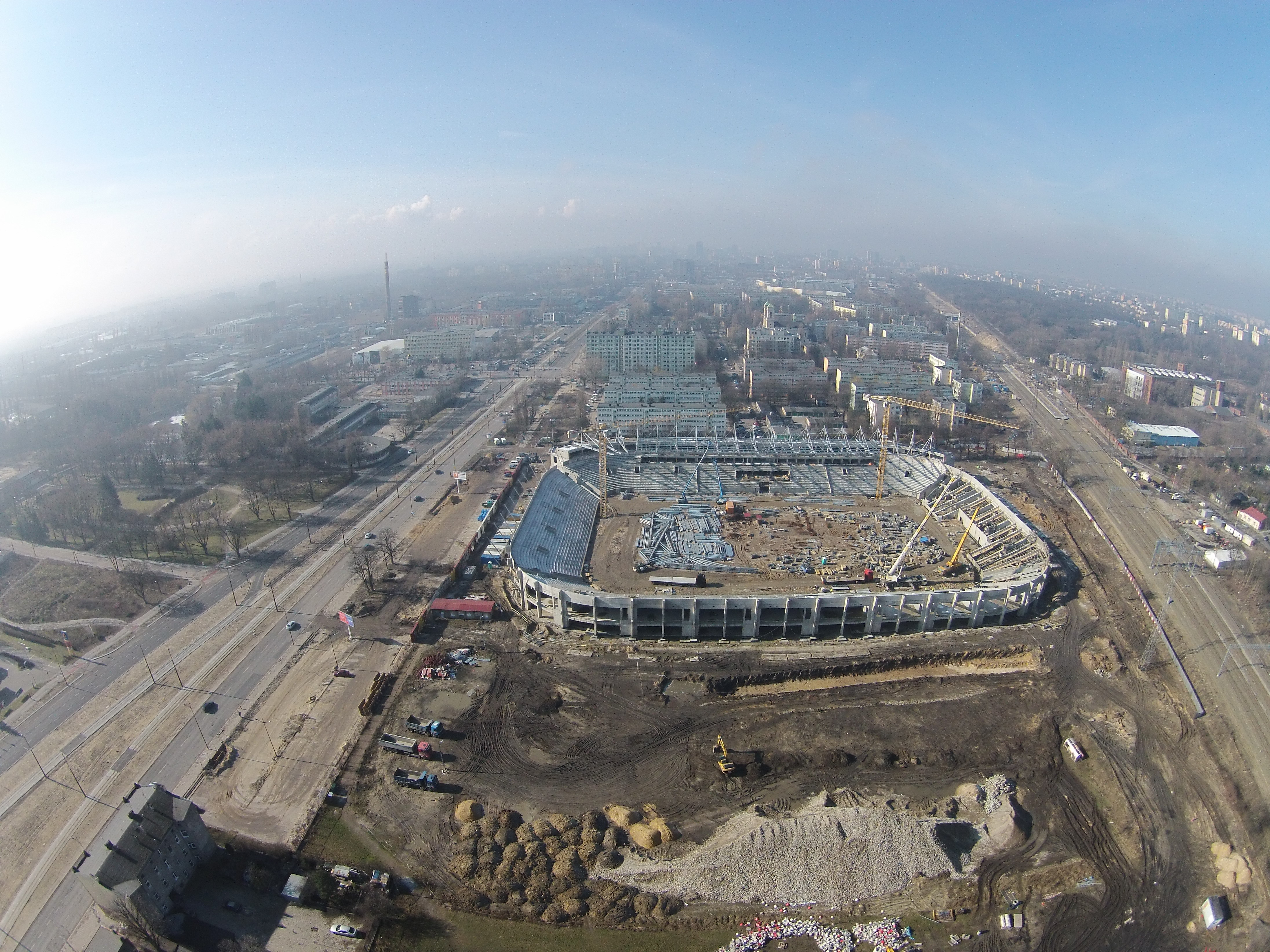 Budow Stadionu Miejskiego w Łodzi Widzewie - 27-02-2016